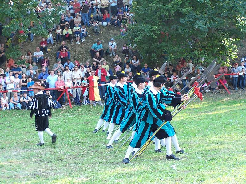 Dębno, Turniej Rycerski 2006.